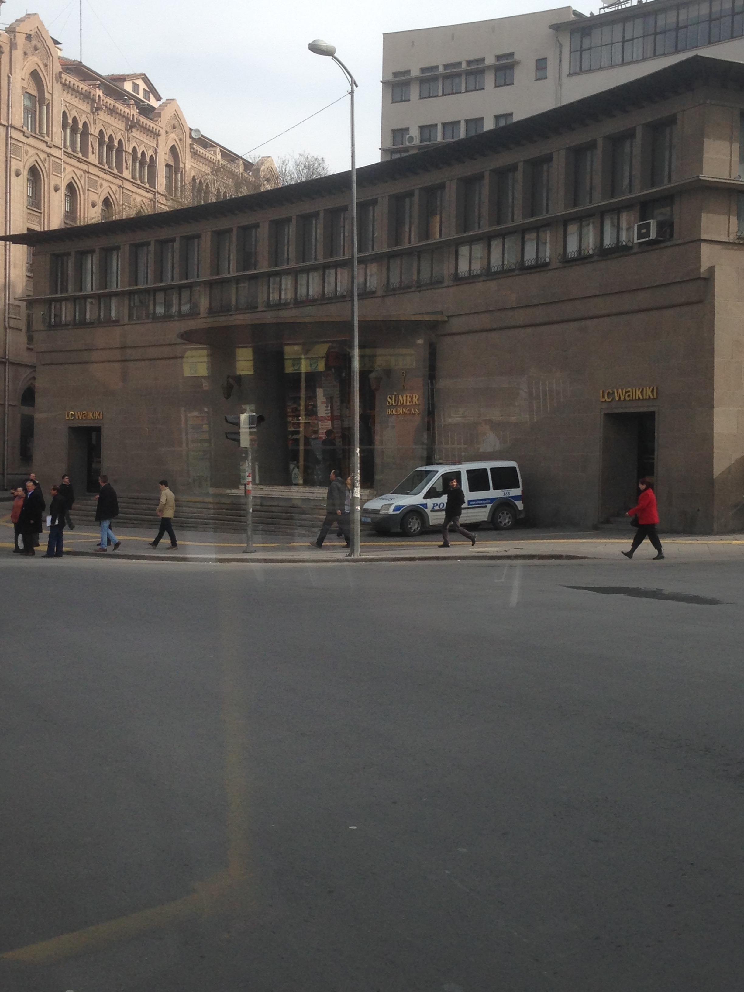 Ankara Ulus'tan bir görüntü.